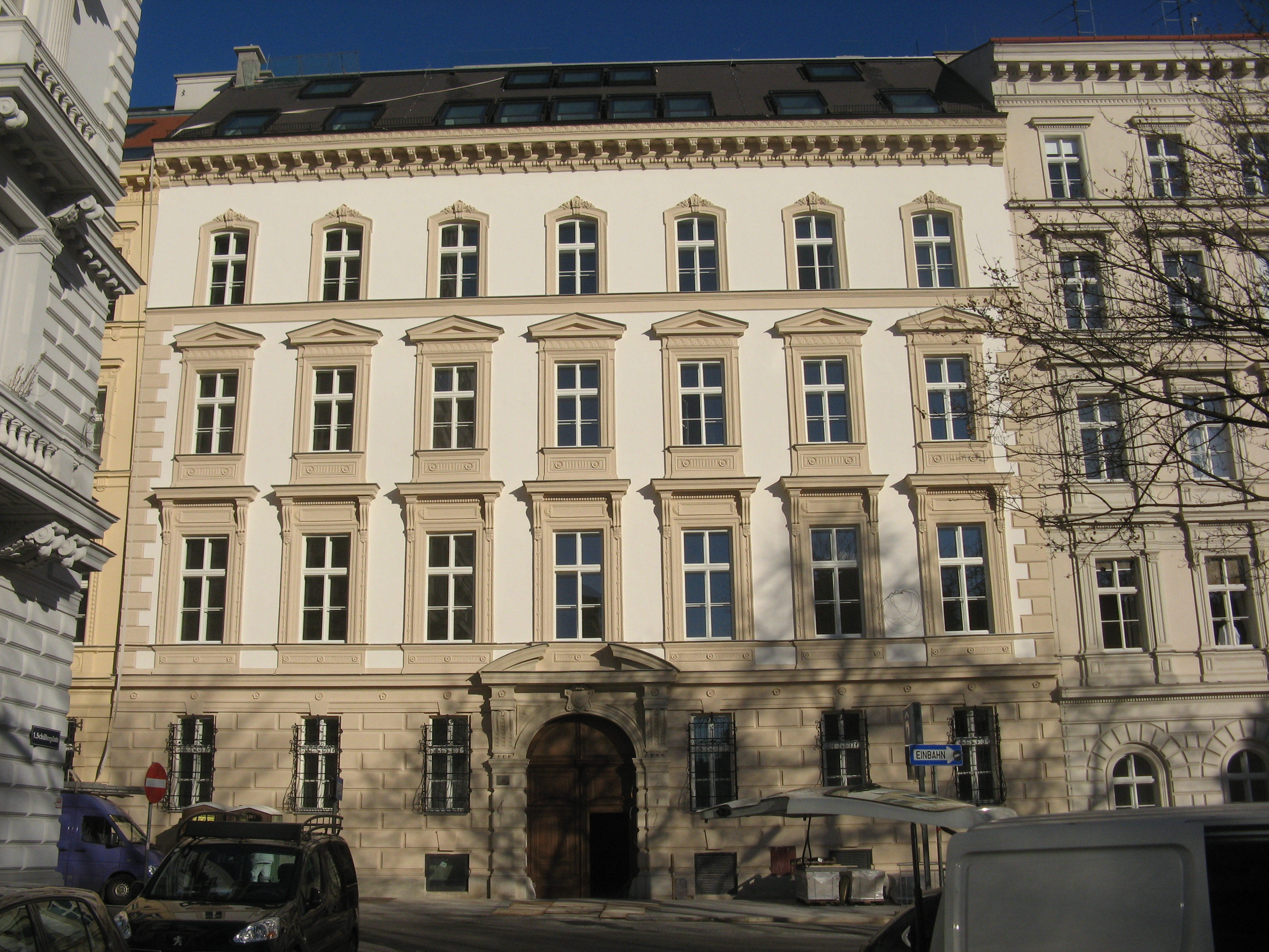 Mayr-Palais (1862) von Johann Romano und August Schwendenwein, Elisabethstraße 18, Wien-Innere Stadt